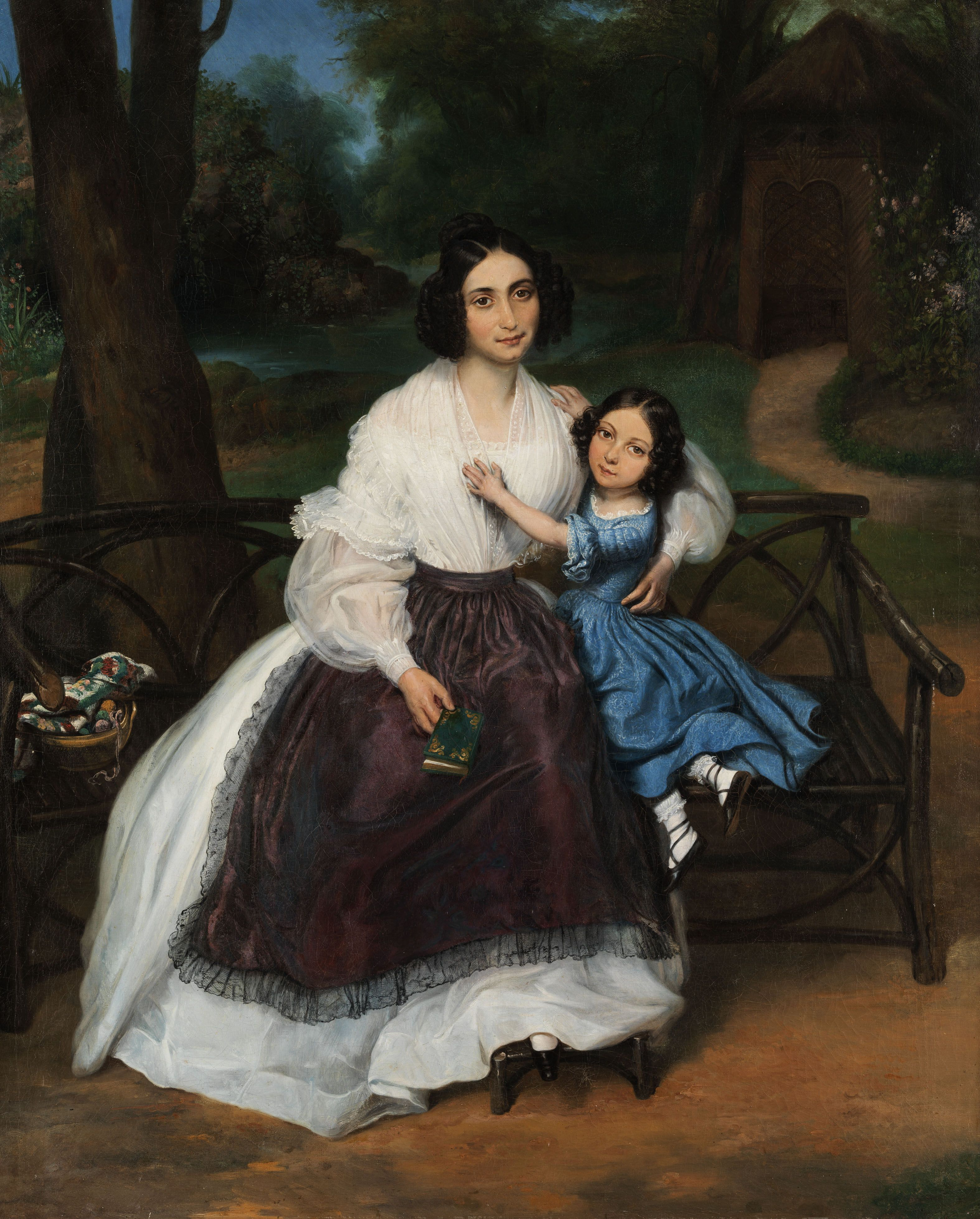 Biedermeier-Portrait einer jungen Frau mit Tochter. Erste Hälfte des 19. Jahrhunderts. Öl auf Leinwand. Doubliert. 101 x 72 cm.